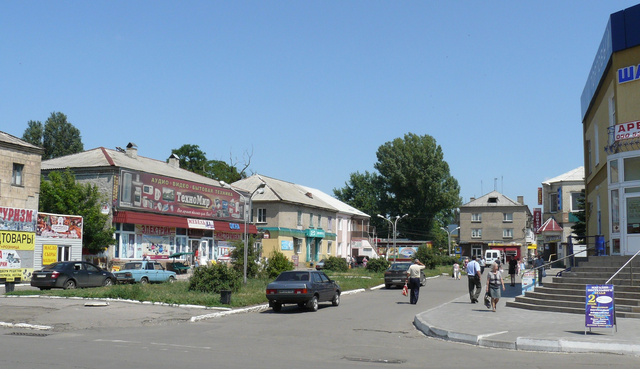 Krasnoarmijsk, centrum miasta.